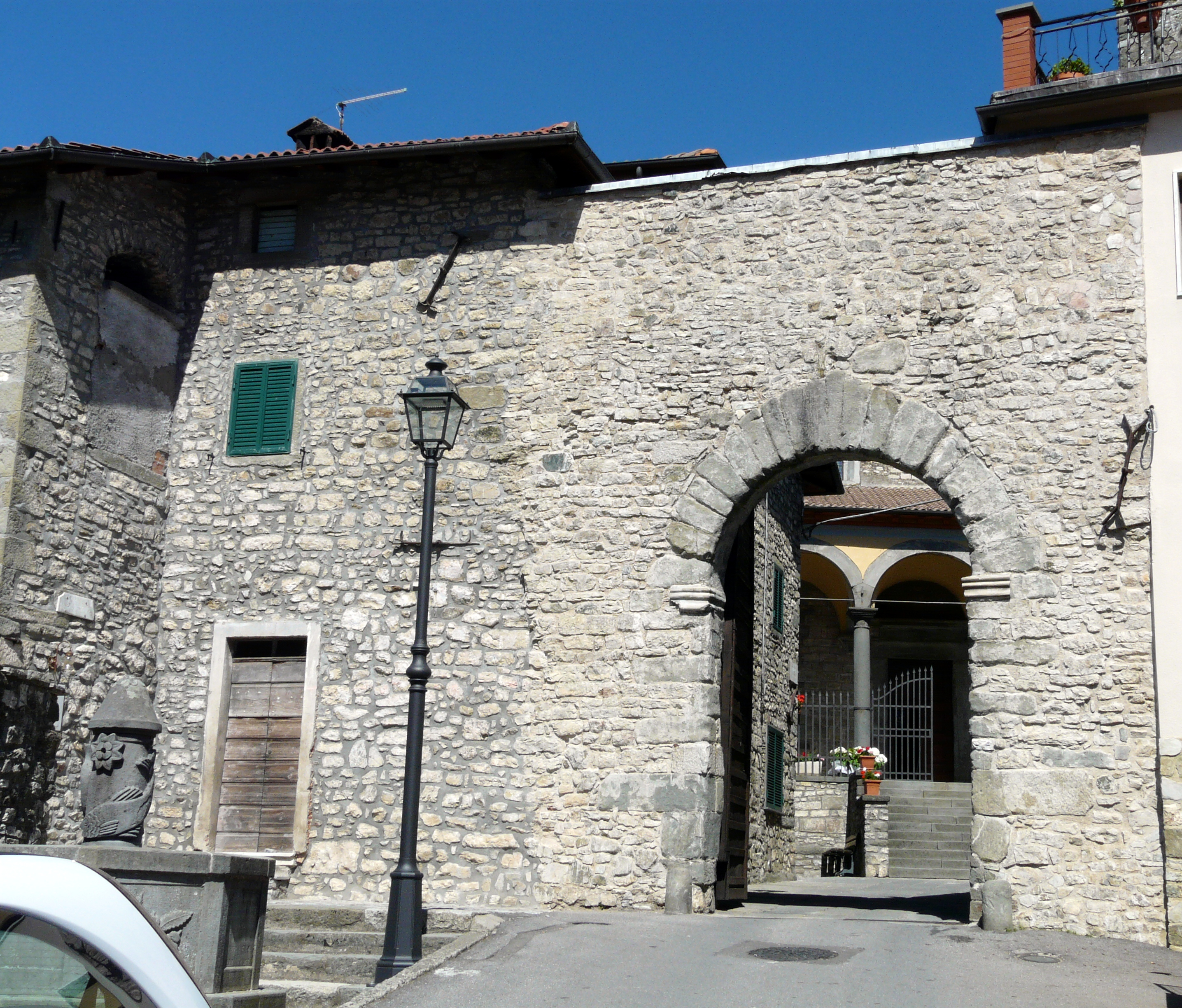 Porta d'accesso al borgo, Careggine, Toscana, Italia